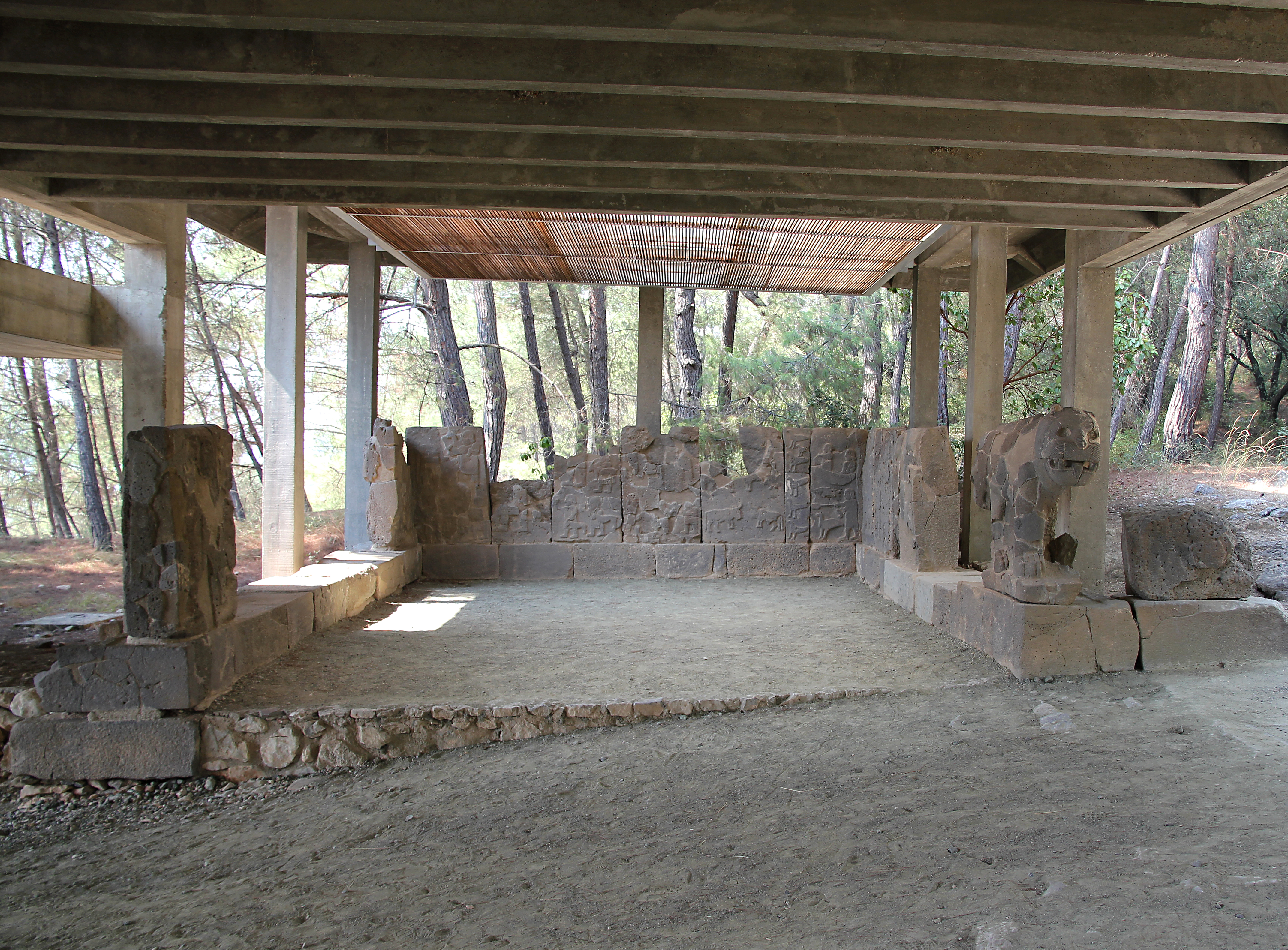 Karatepe (Asatiwataya), neo-hethitischer Fundort bei Osmaniye, Südtürkei, Abschnitt des Südtores